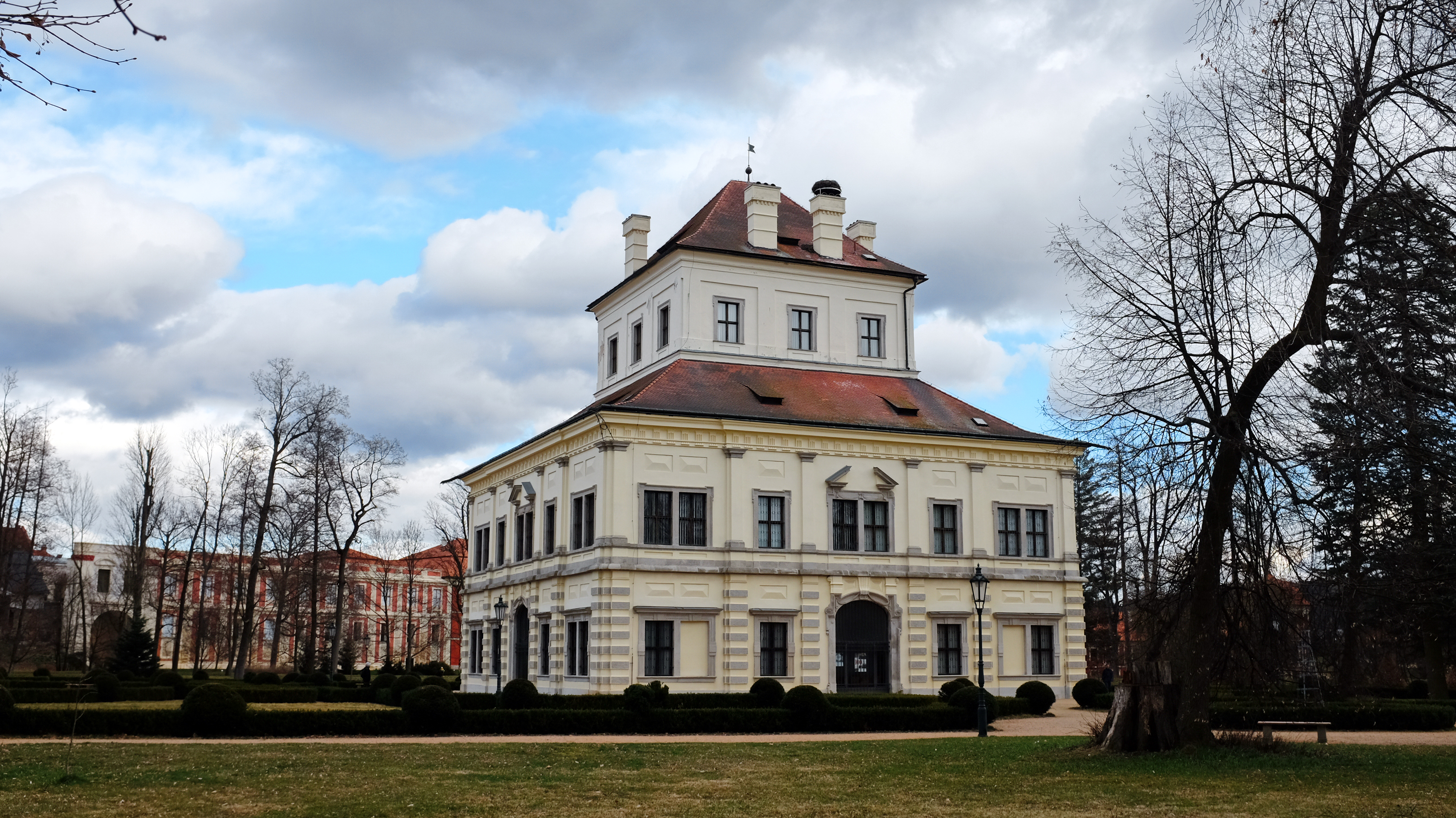 Zámek Ostrov, Jáchymovská 1, Ostrov (okres Karlovy Vary).